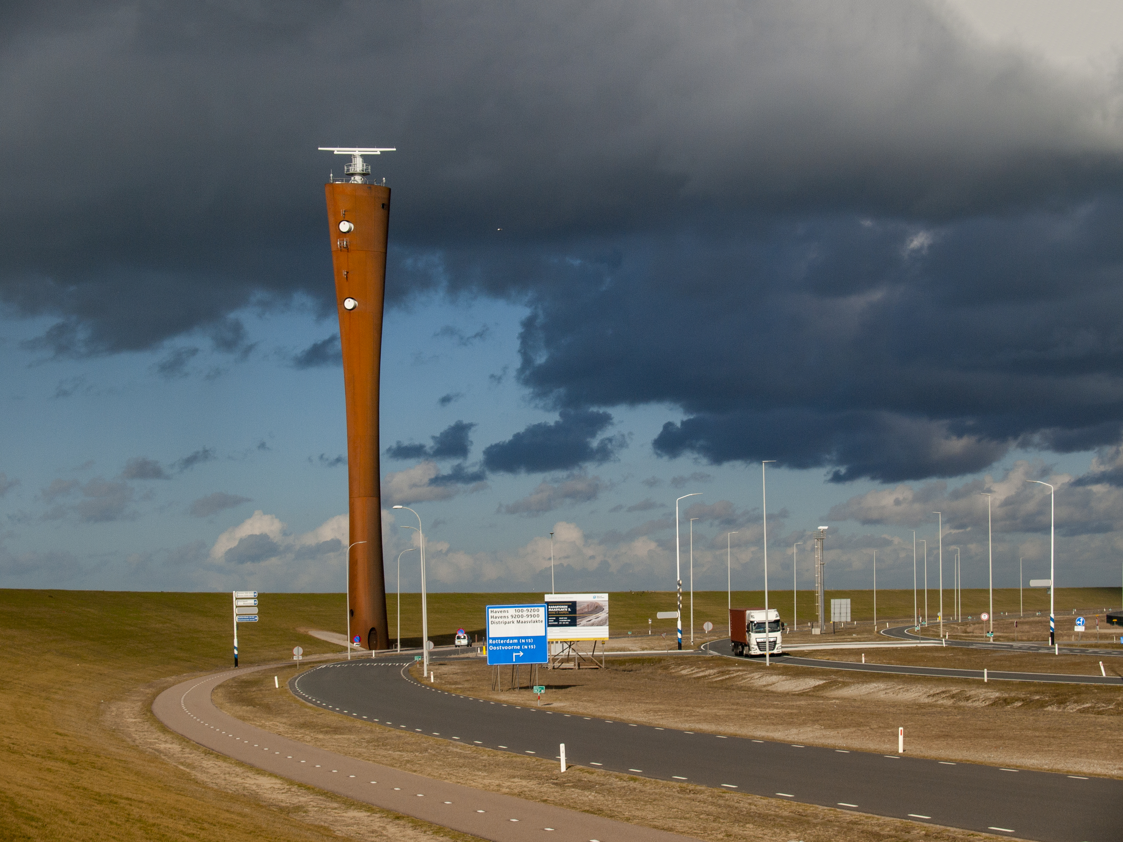 Radartoren Tweede Maasvlakte